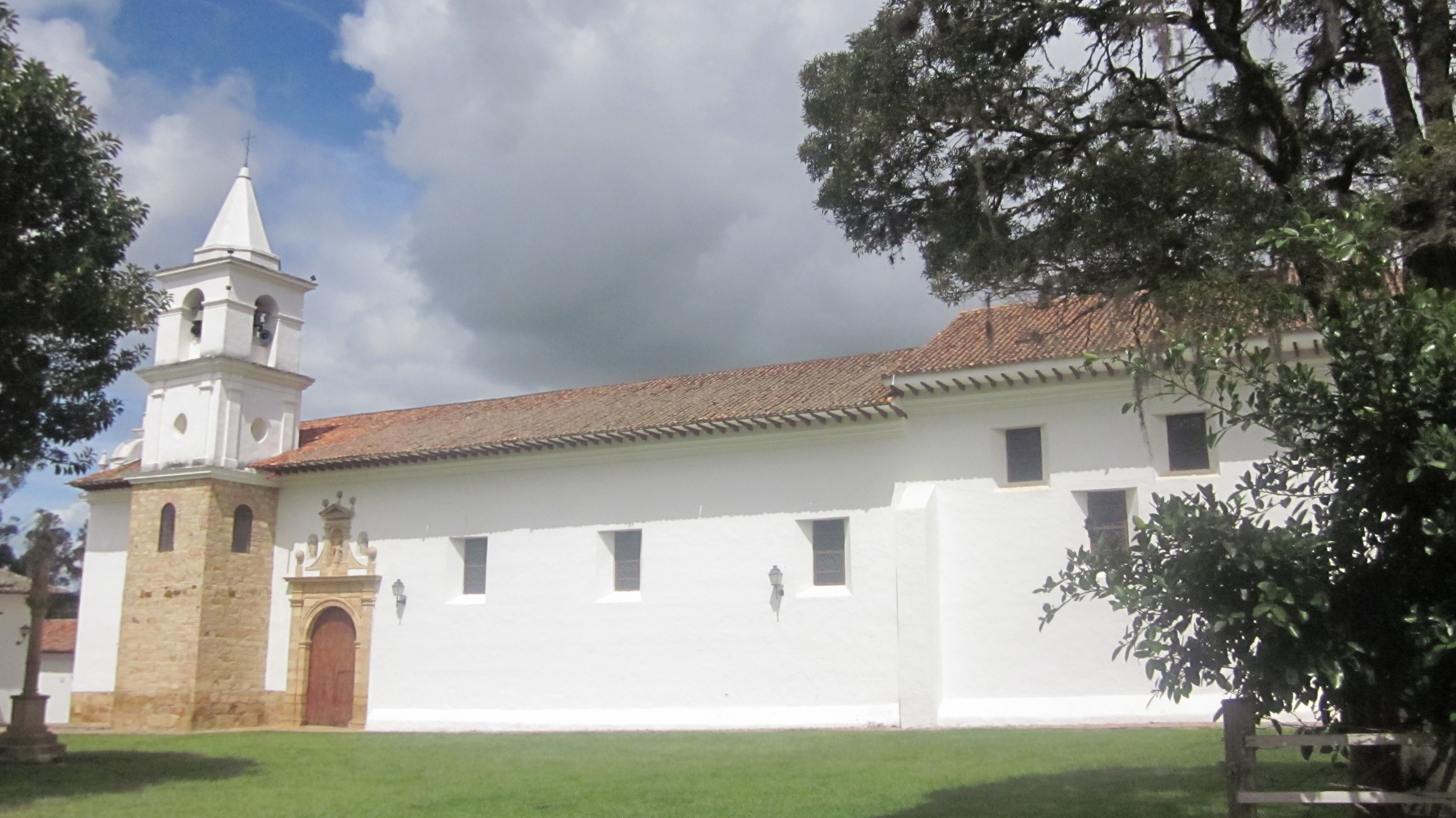 Iglesia Nuestra Señorea del Carmen, Villa de Leyva